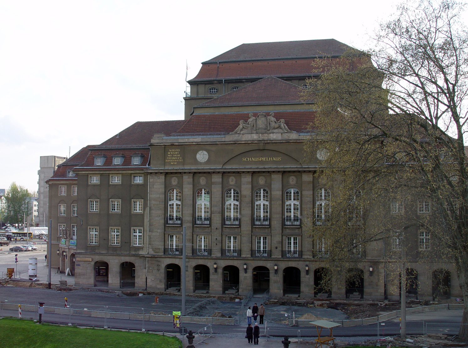 Das Große Haus des Staatsschauspiels Dresden vom Kronentor aus.